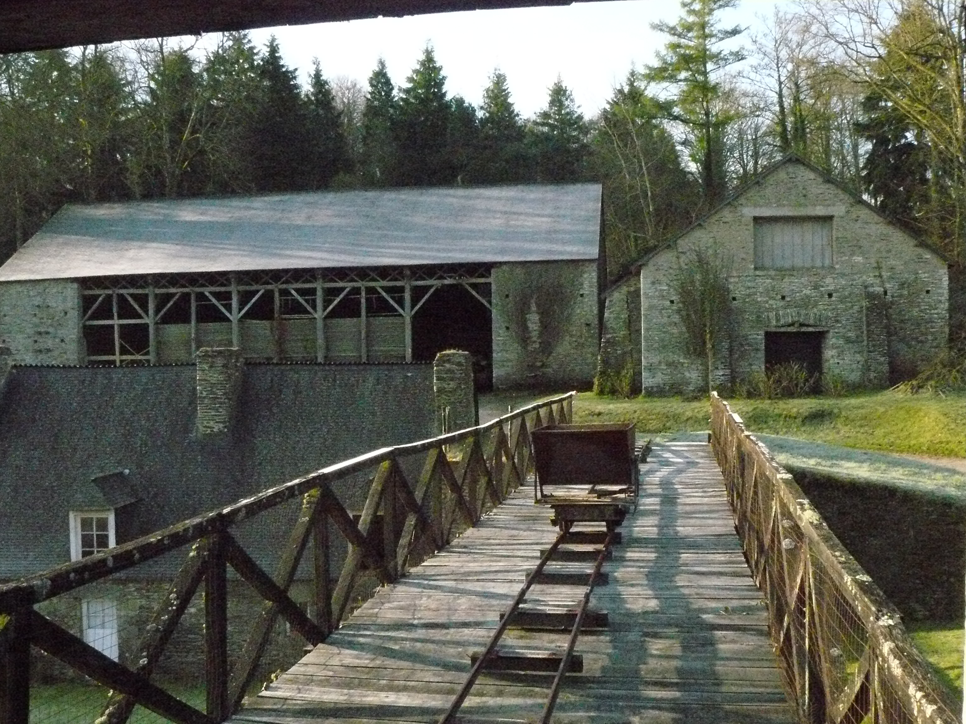 Grande et petite halle des forges des Salles